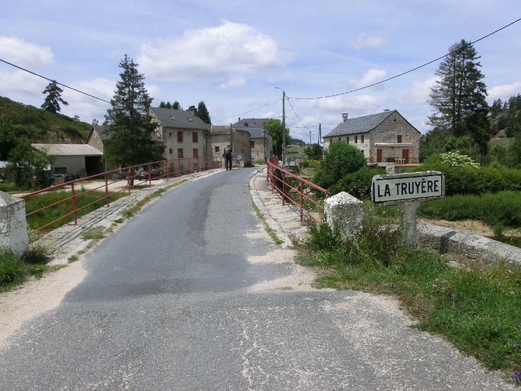 Pont sur la Truyère aux Estrets, commune de Fontans (Lozère).